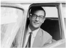 Carmine Pecorelli. Morto a Roma il 20 marzo 1979.